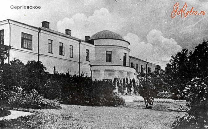 Усадьба князей Гагариных "Сергиевское"